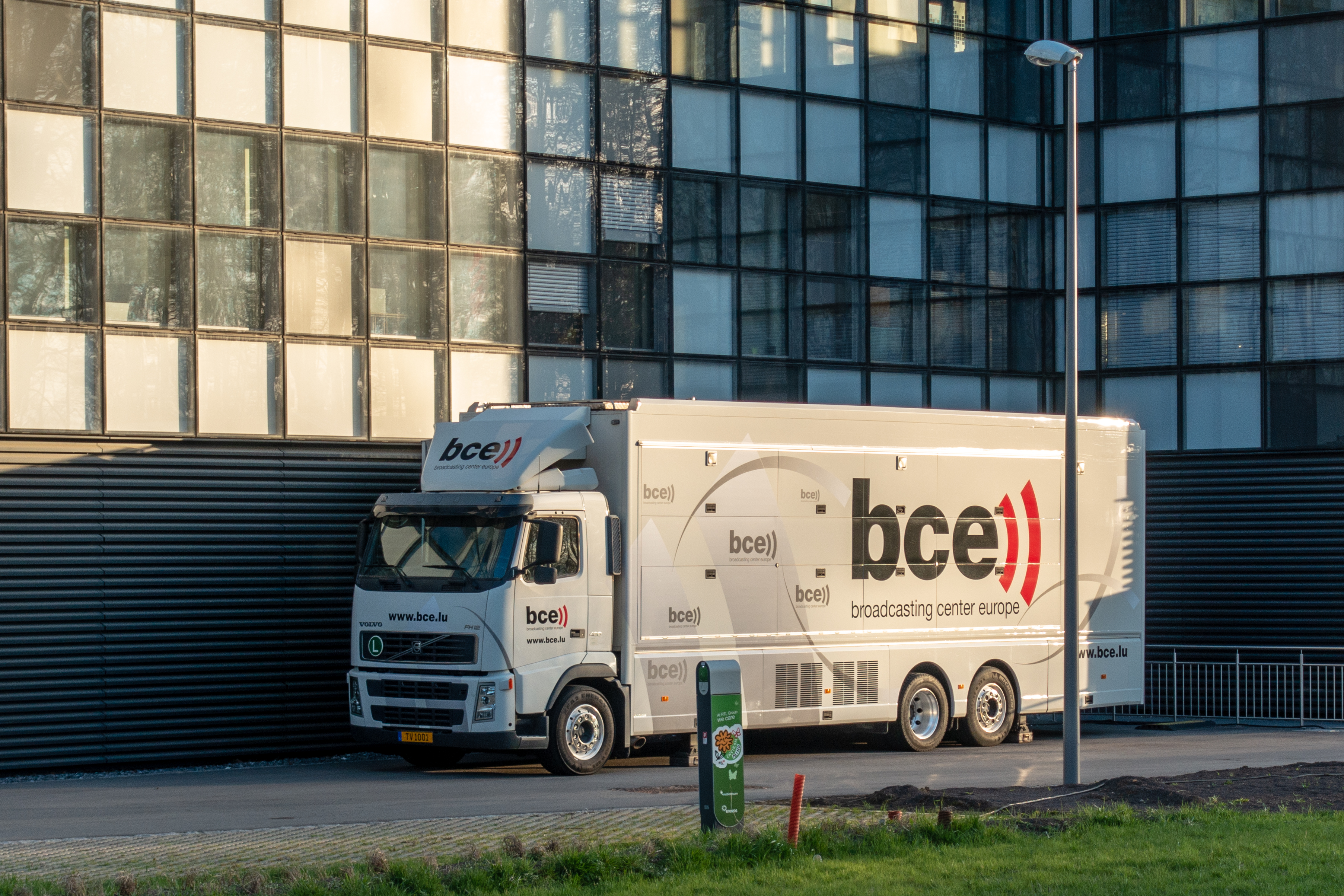 Transmissiounswon BCE (Group RTL) beim neie Siège, 43, Boulevard Pierre Frieden um Kierchbierg.